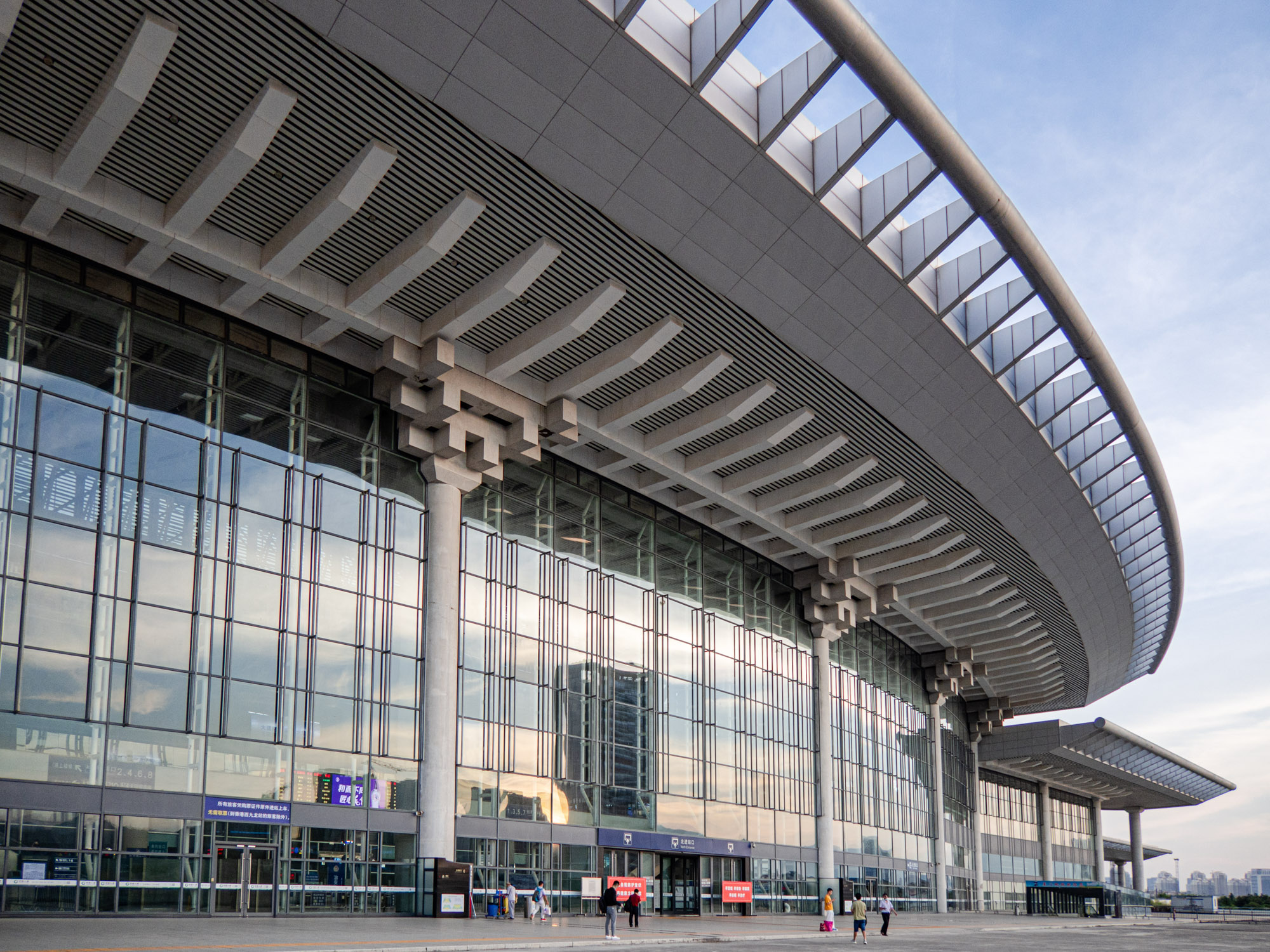 中文（中国大陆）: 中国铁路厦门北站